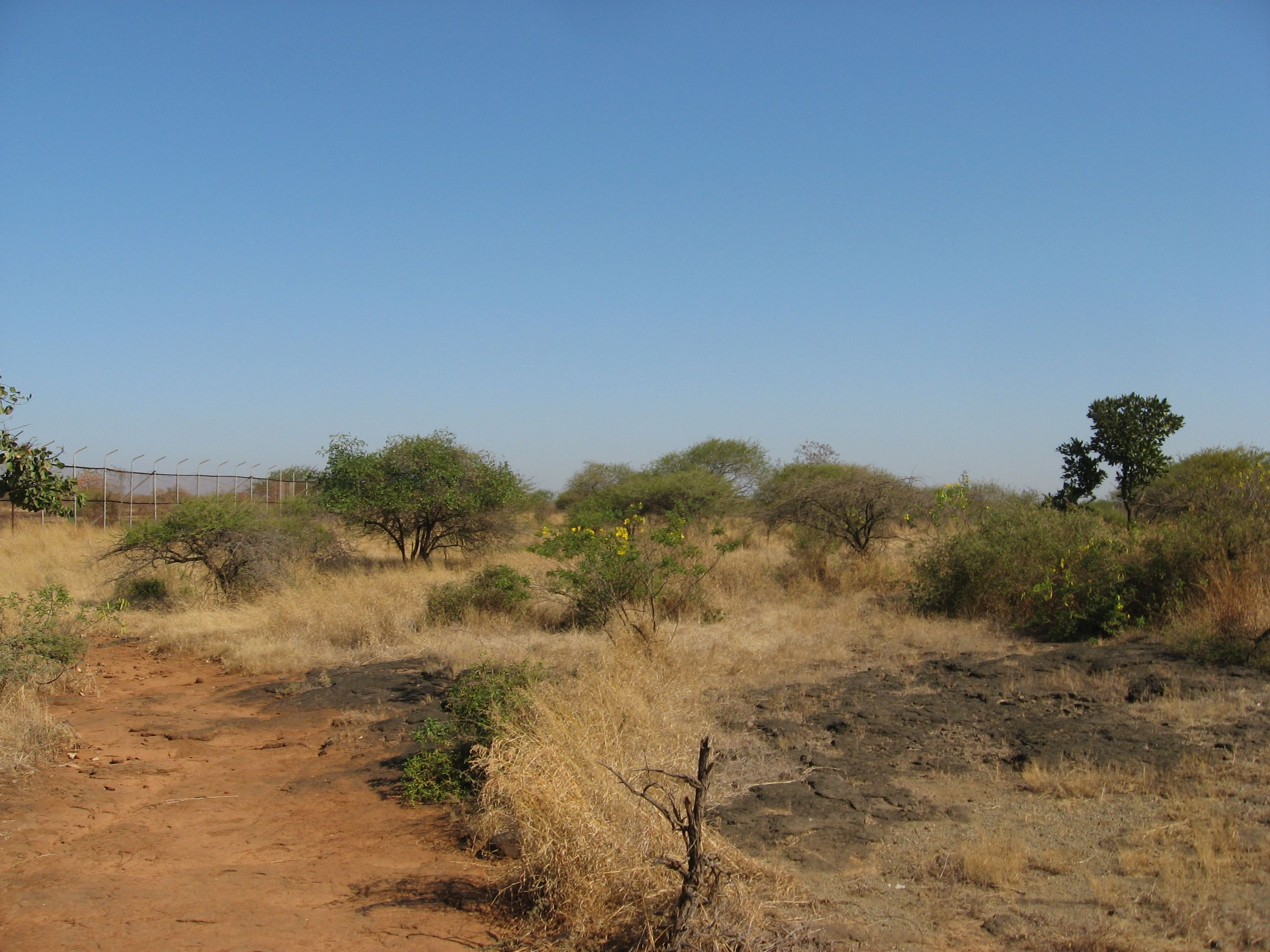 நீலானின் வாழிடம். கிர் காடுகள் குசராத், இந்தியா